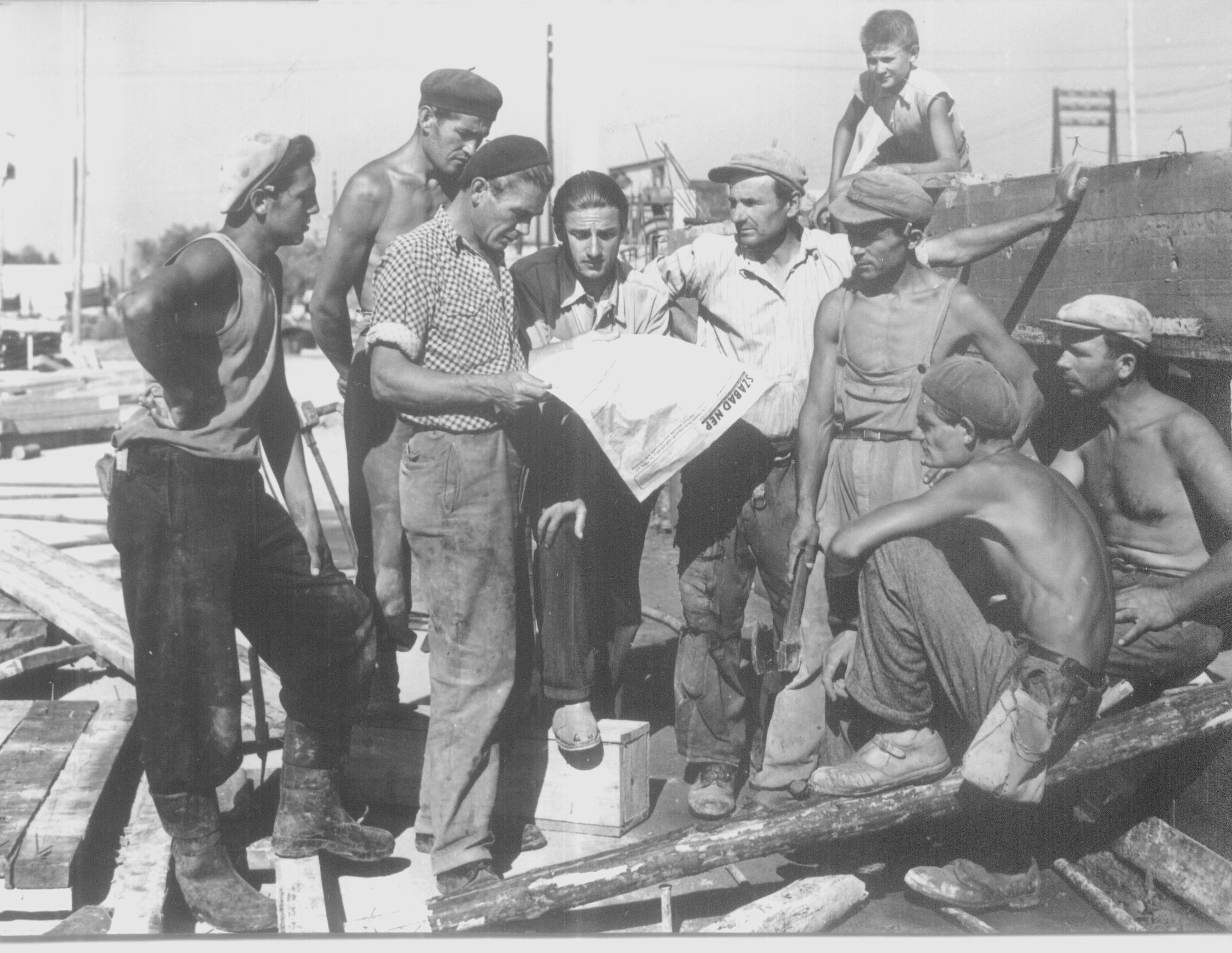 A Kossuth-díjas Bunda János ács brigádja, munkaszünetben Szabad Nép-cikket olvasnak.